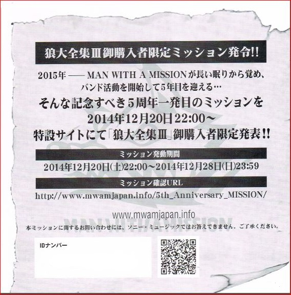 IDナンバーと、右下に印字されていた英数字は、加工してある。